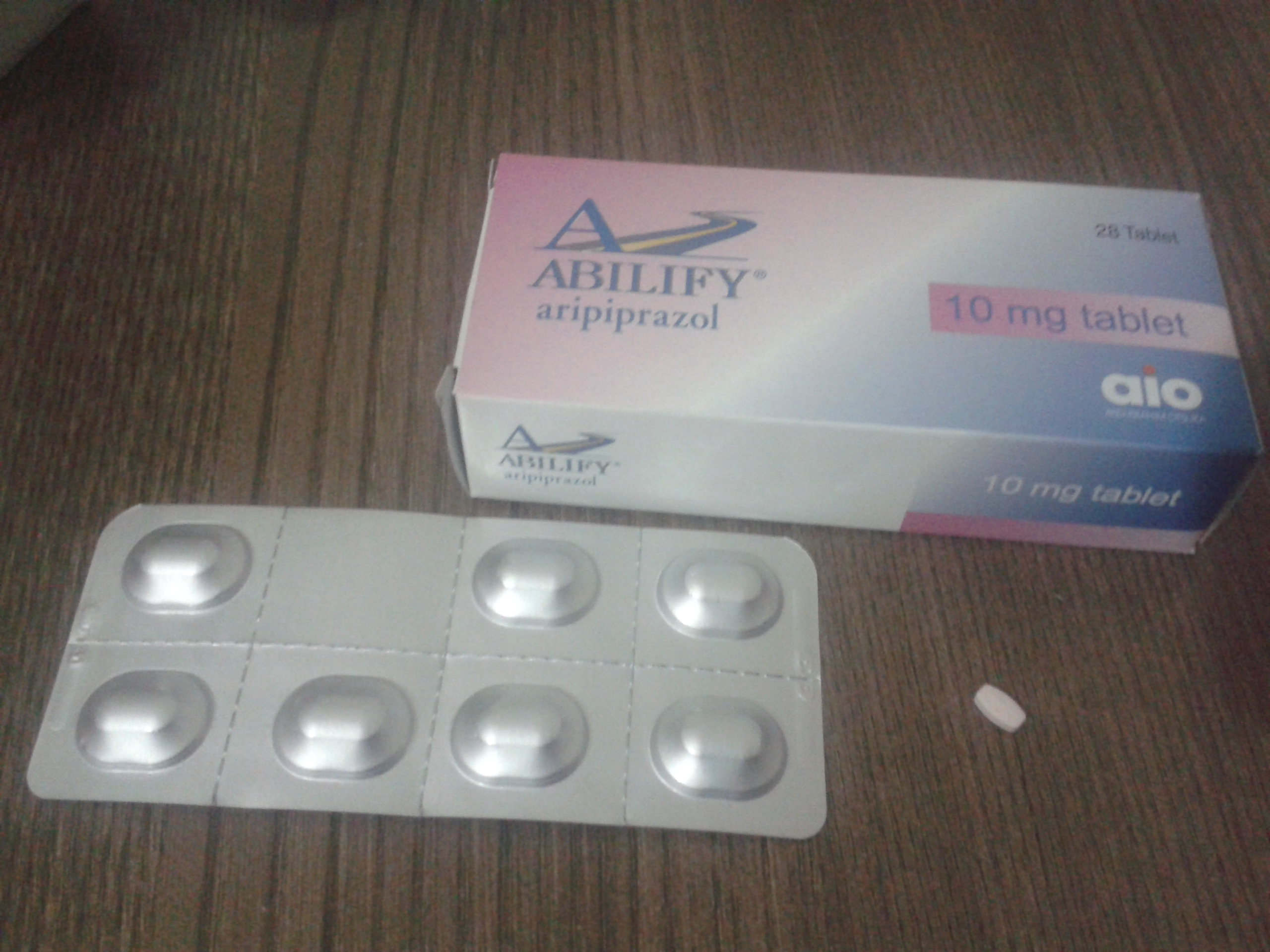 Abilify 10mg